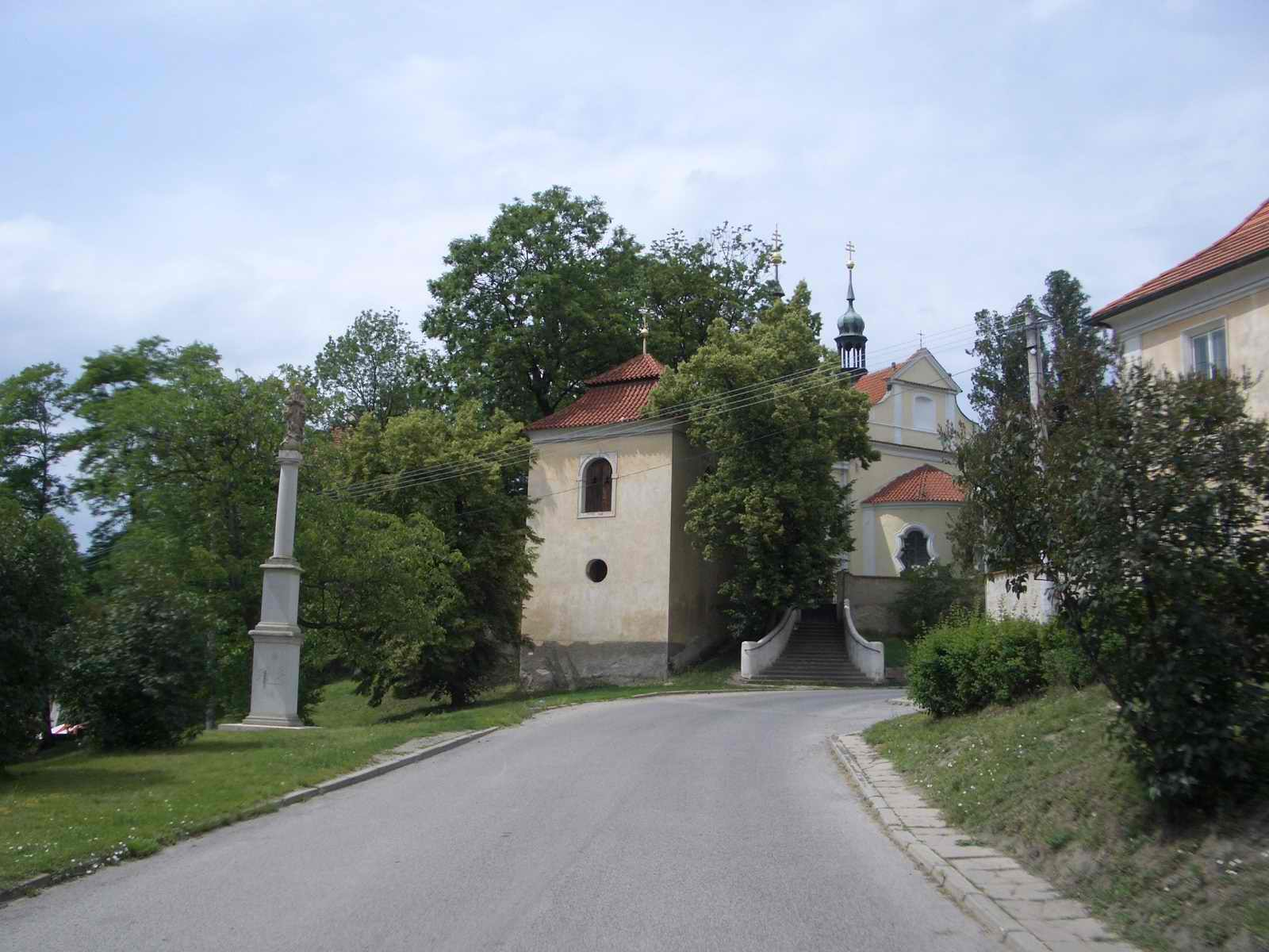 Cítov, kulturní památky